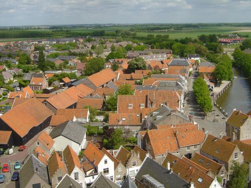 Uitzicht goededereede van uit de toren